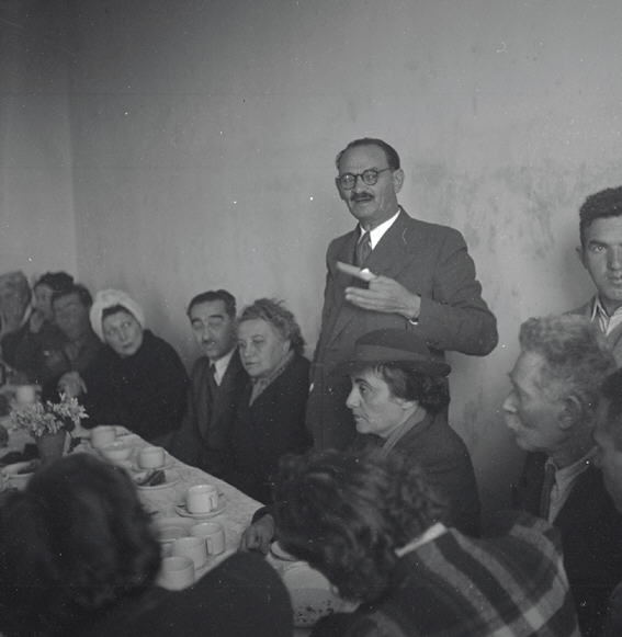 מר יוסף ויץ נואם בחגיגת נטיעת יער "הדסה" בקנדה , מעלה-החמישה